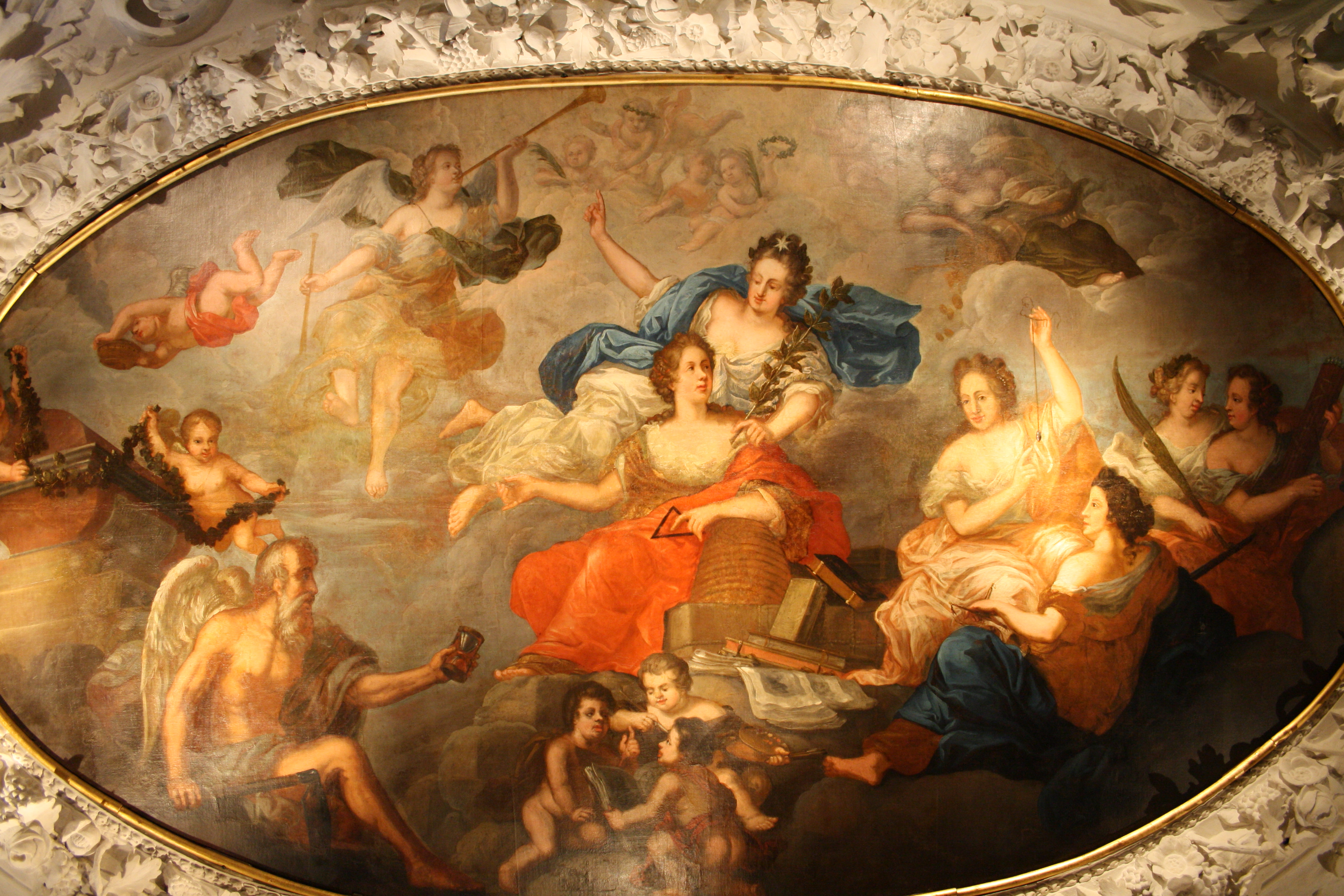 Deckengemälde aus dem Haus Katharinenstraße 9, ausgestellt im Museum für Hamburgische Geschichte. Das Gemälde malte der Hamburger Dekorationsmaler Johann Moritz Riesenberger der Jüngere. Es zeigt vor allem Figuren, die Arbeit und Wissenschaft symbolisieren.